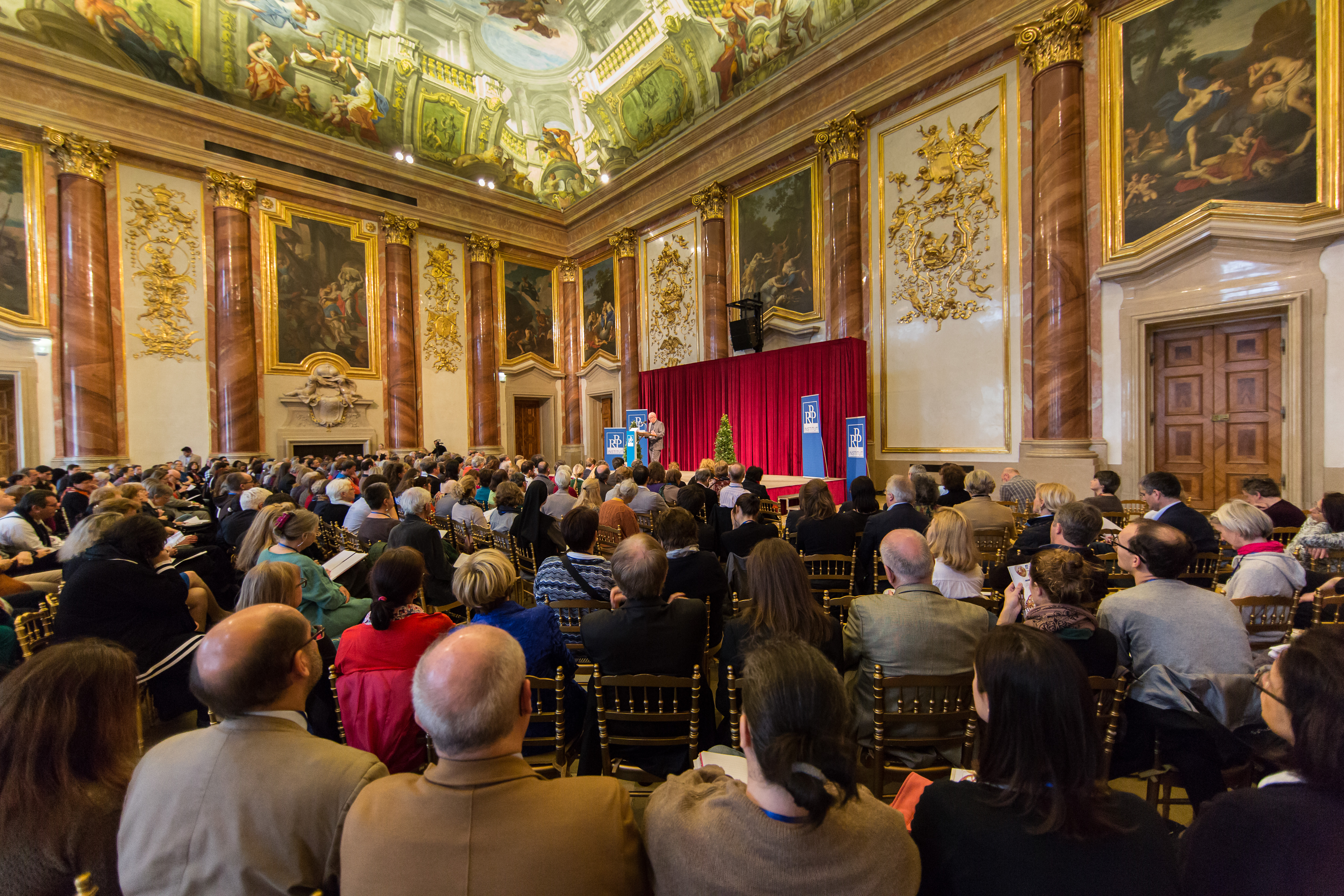 Palais Liechtenstein (Fürstengasse): Fachtagung des RPP-Institutes über "Glück und Seligkeit" am 20. April 2013